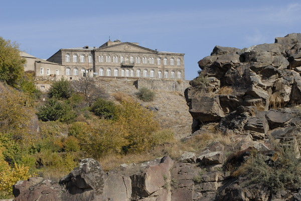 Մեսրոպ Մաշտոցի անվան դպրատունը